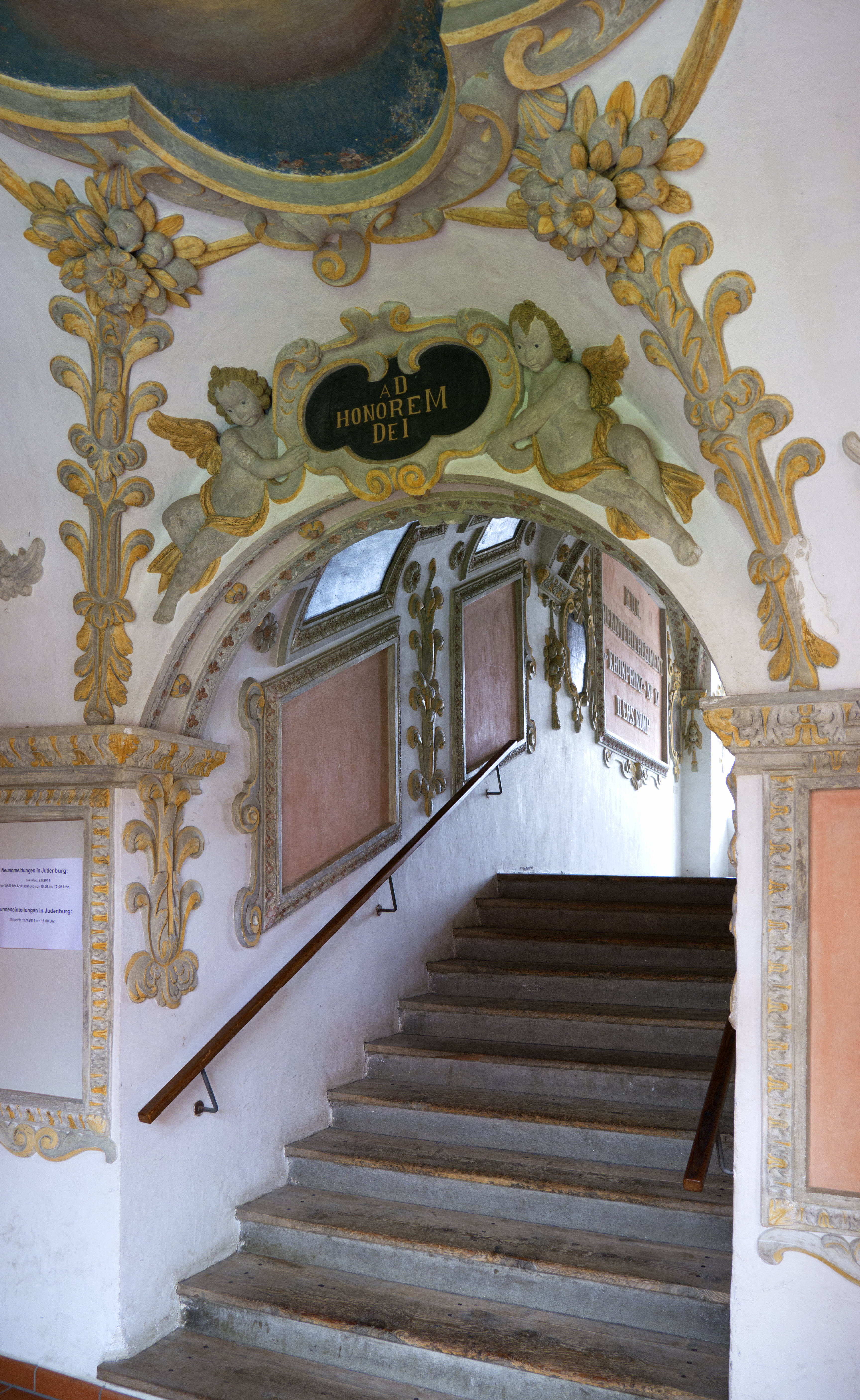 ehem. Jesuitenkloster